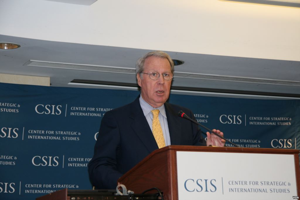 中文（台灣）: 美國在臺協會主席薄瑞光。